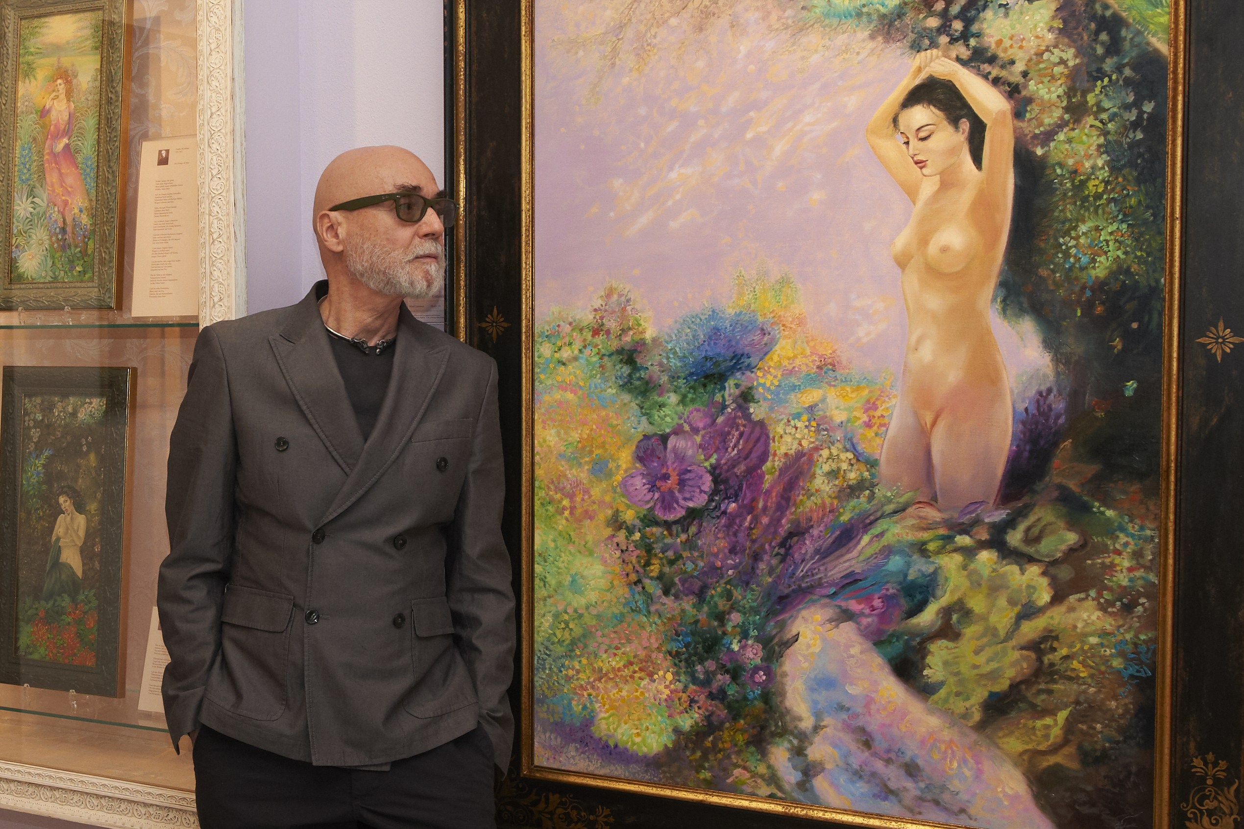 Gero Trauth (2012)